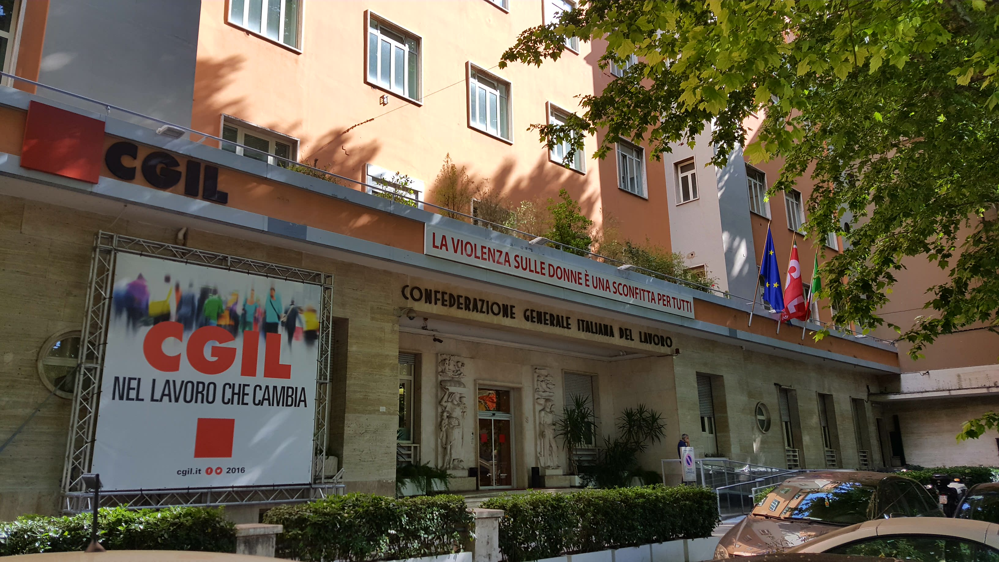 Sede centrale CGIL a Roma, Corso d'Italia